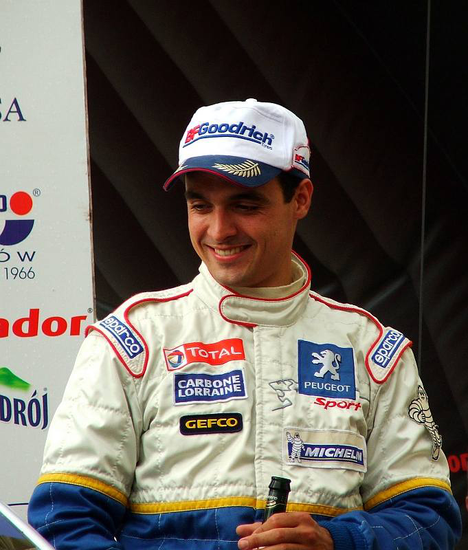 Bryan Bouffier remporte le Championnat de Pologne 2007